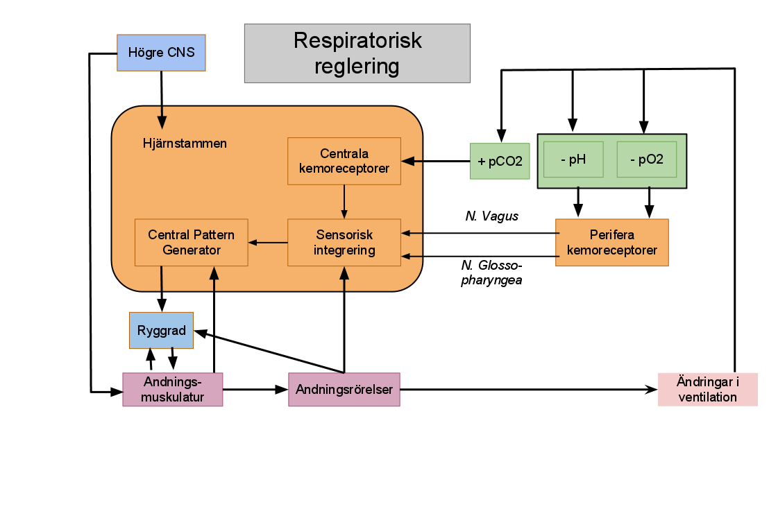 Översiktsbild över områden och mekanismer involverade i respiratorisk reglering